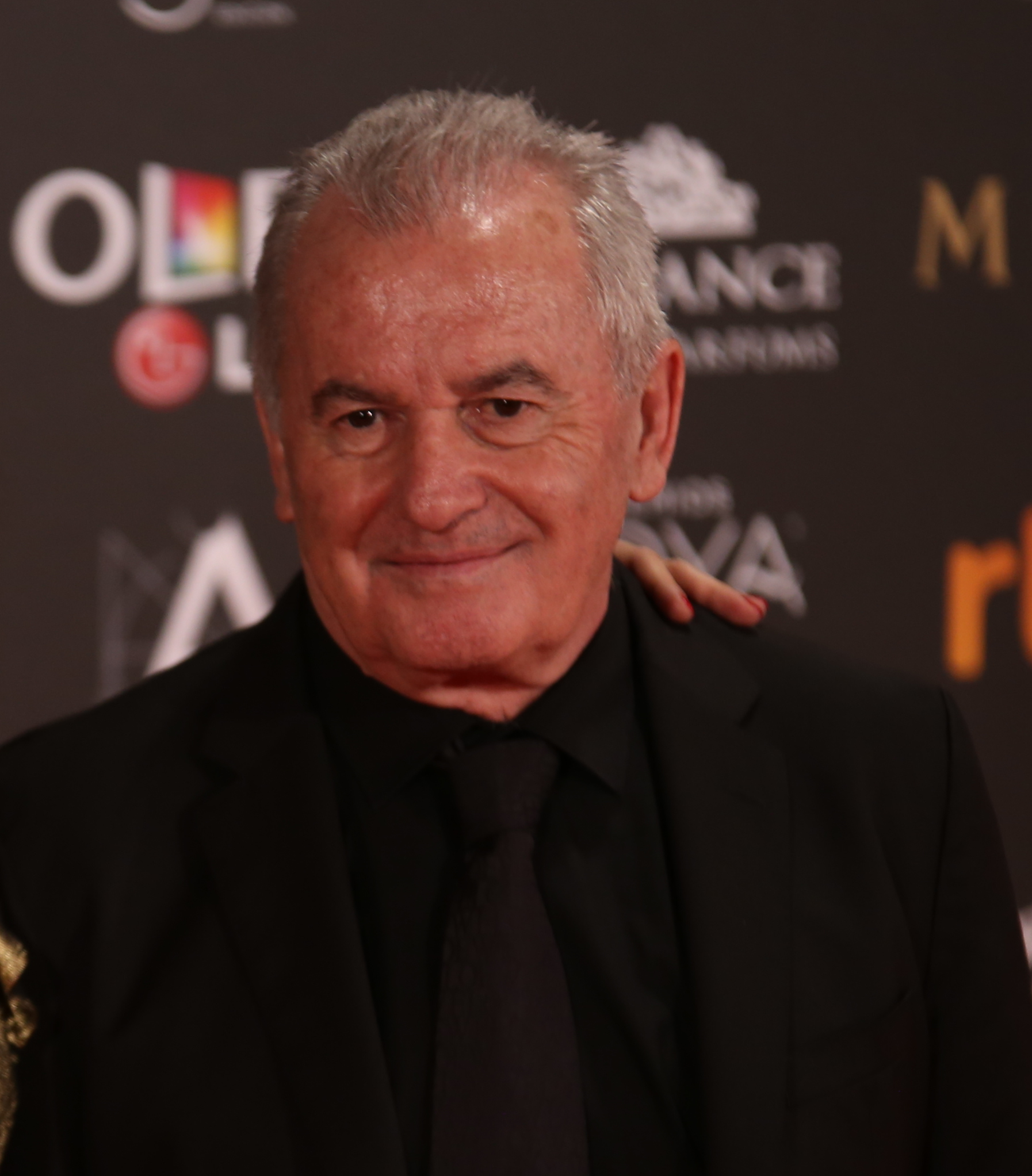 Premios Goya 2017